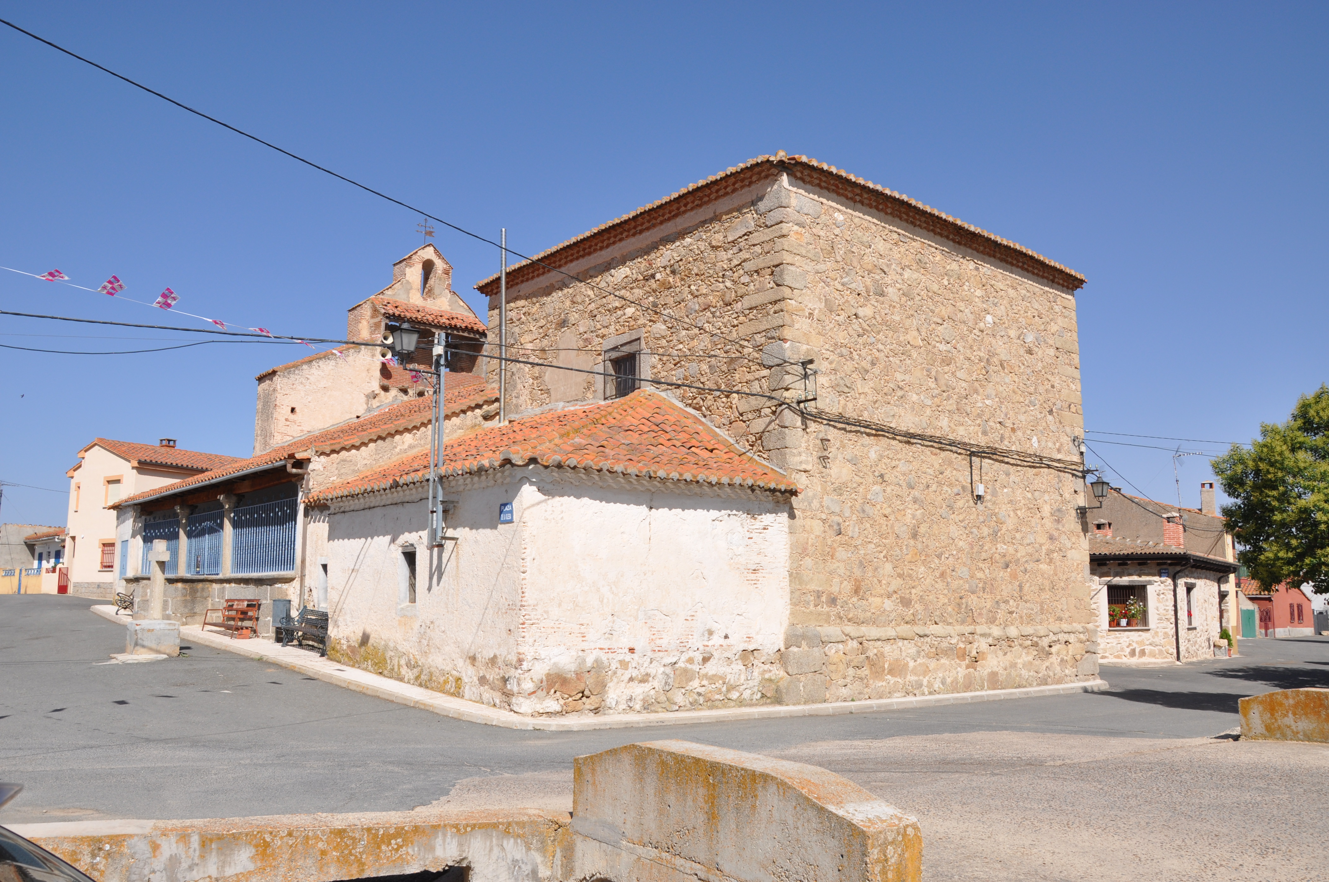 Iglesia parroquial de la Magdalena, Gemuño, Ávila, España